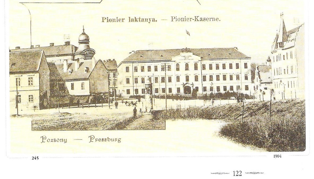 Nach 1945 abgerissen, es stand am ehemaligen König Andreas-Platz, heute Safarikovo nám. in Bratislava